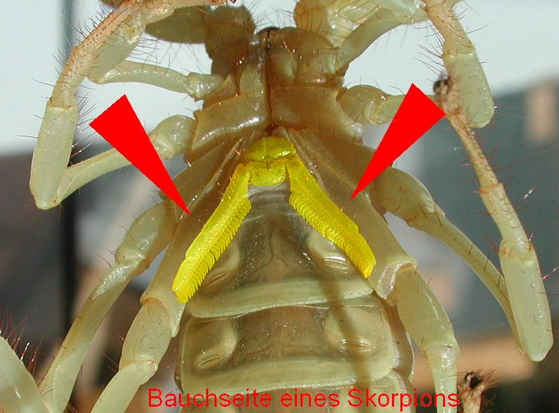 Kammorgan, Pecten eines Skorpions aus Gefangenschaft, Hadrurus arizonensis, Haariger Wüstenskorpion, Desert Hairy Scorpion